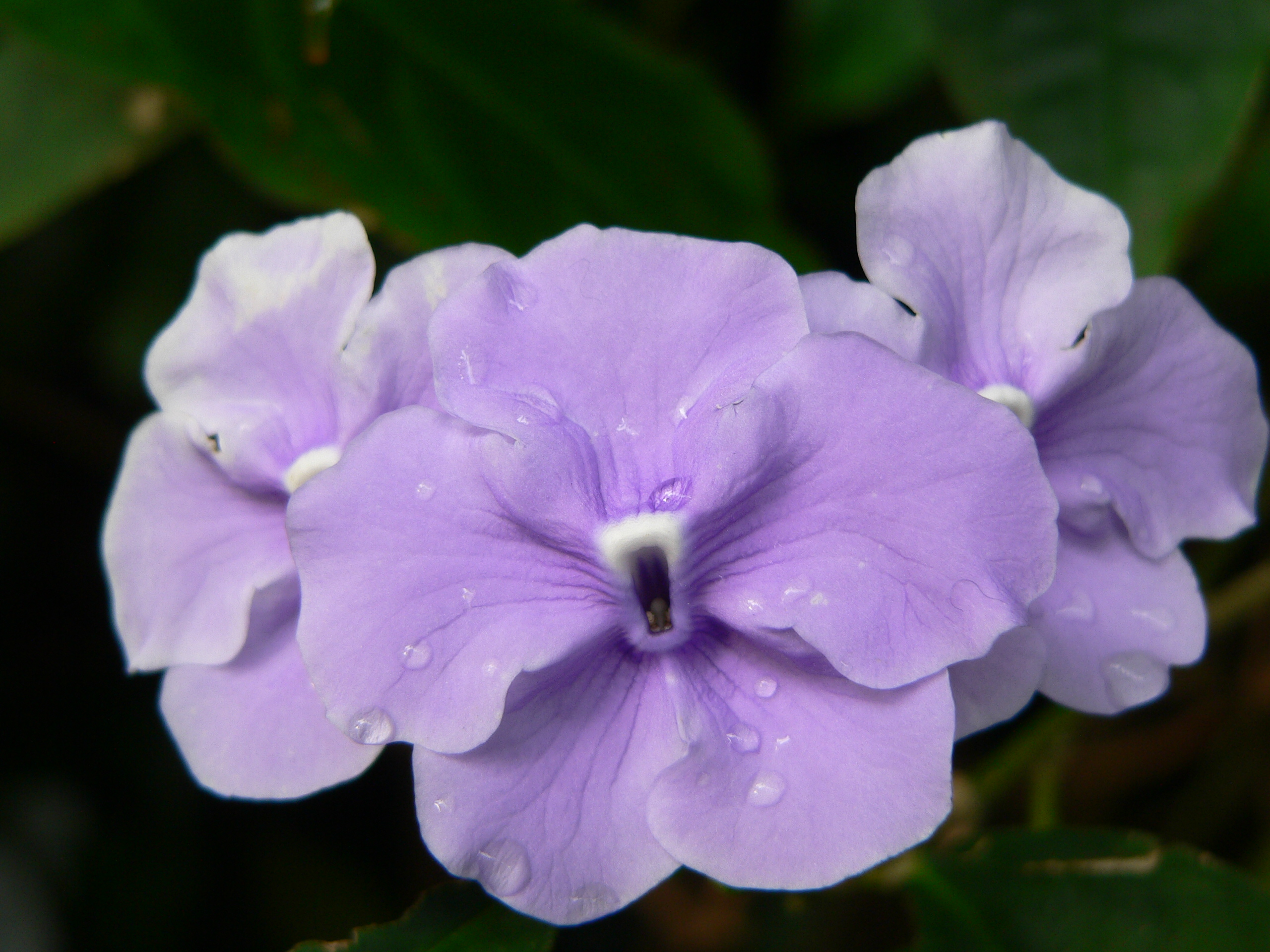 Brunfelsia panciflora